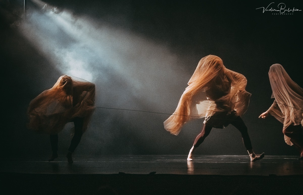 Фрагмент перформанса.